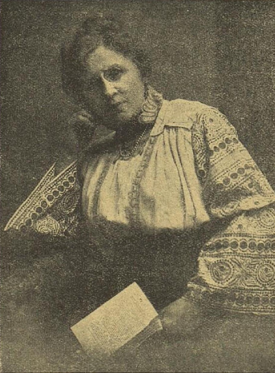 Amalie Kožmínová (1876-1951), česká etnografka